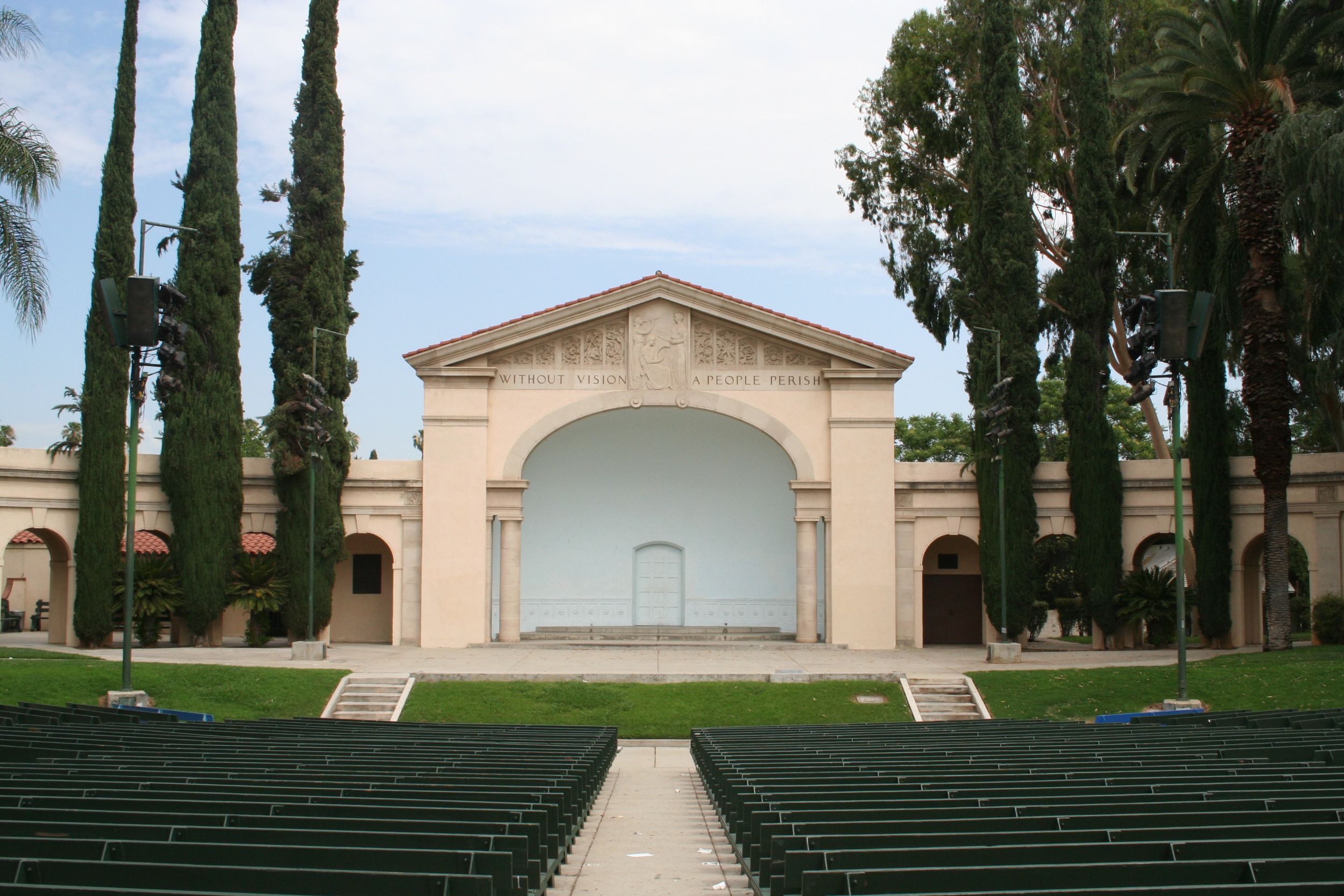 Redlands Bowl